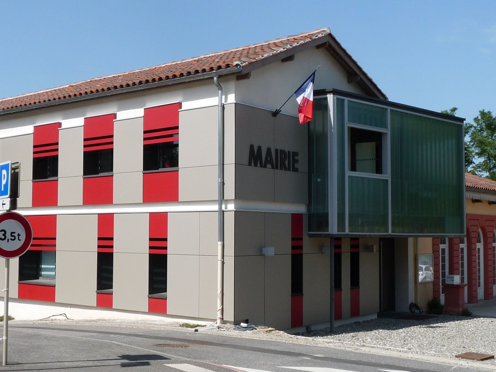 Mairie de Péchabou, Haute-Garonne, France